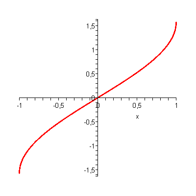 functie zelf, Maple 9.5 MADe 8 aug 2005 14:30 (CEST)